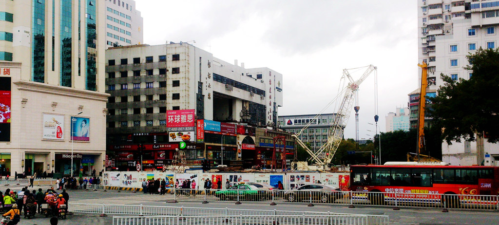 福州地铁东街口站施工中